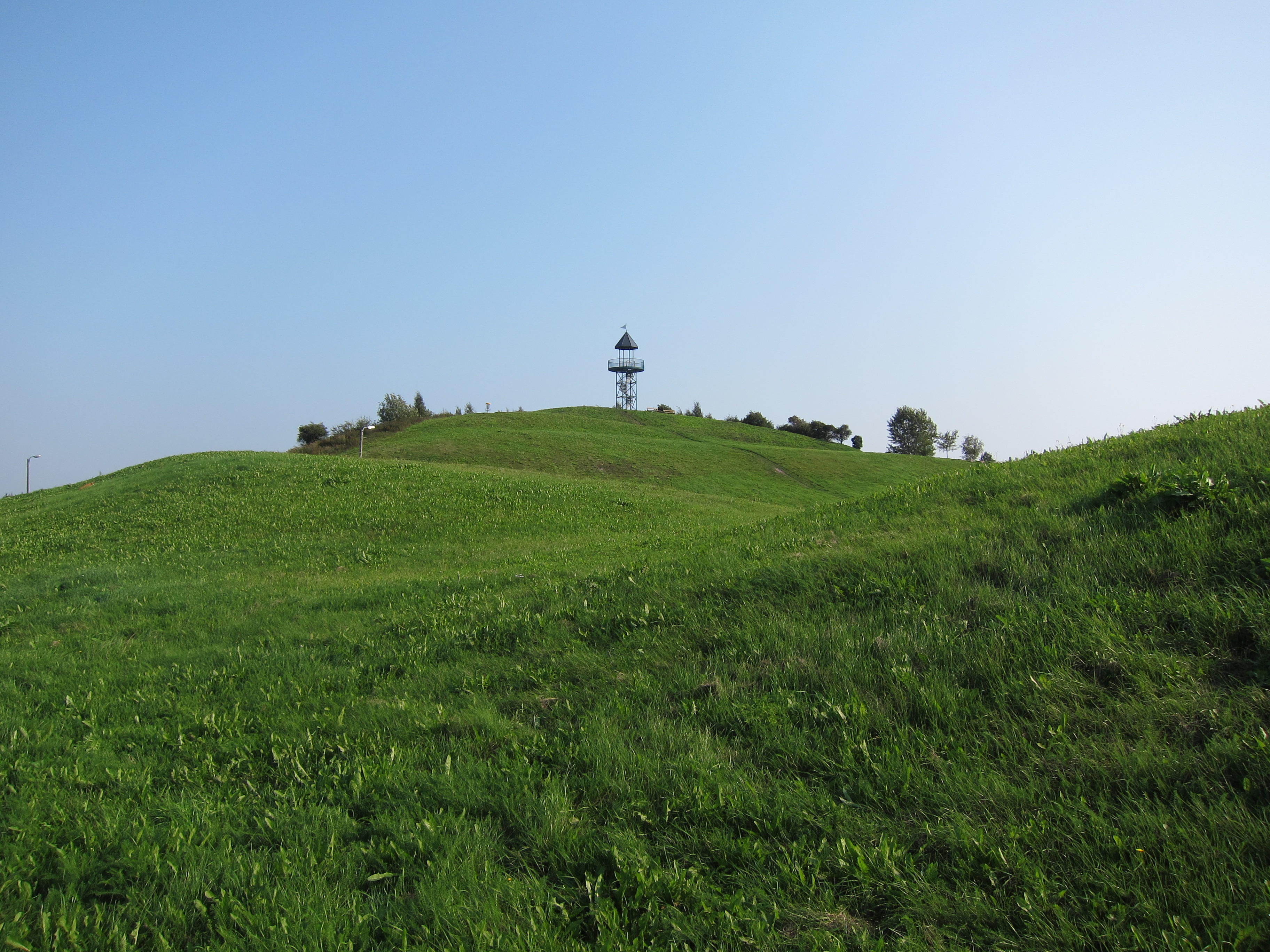 Kumparepuisto Kotkassa Otsolan kaupunginosassa.